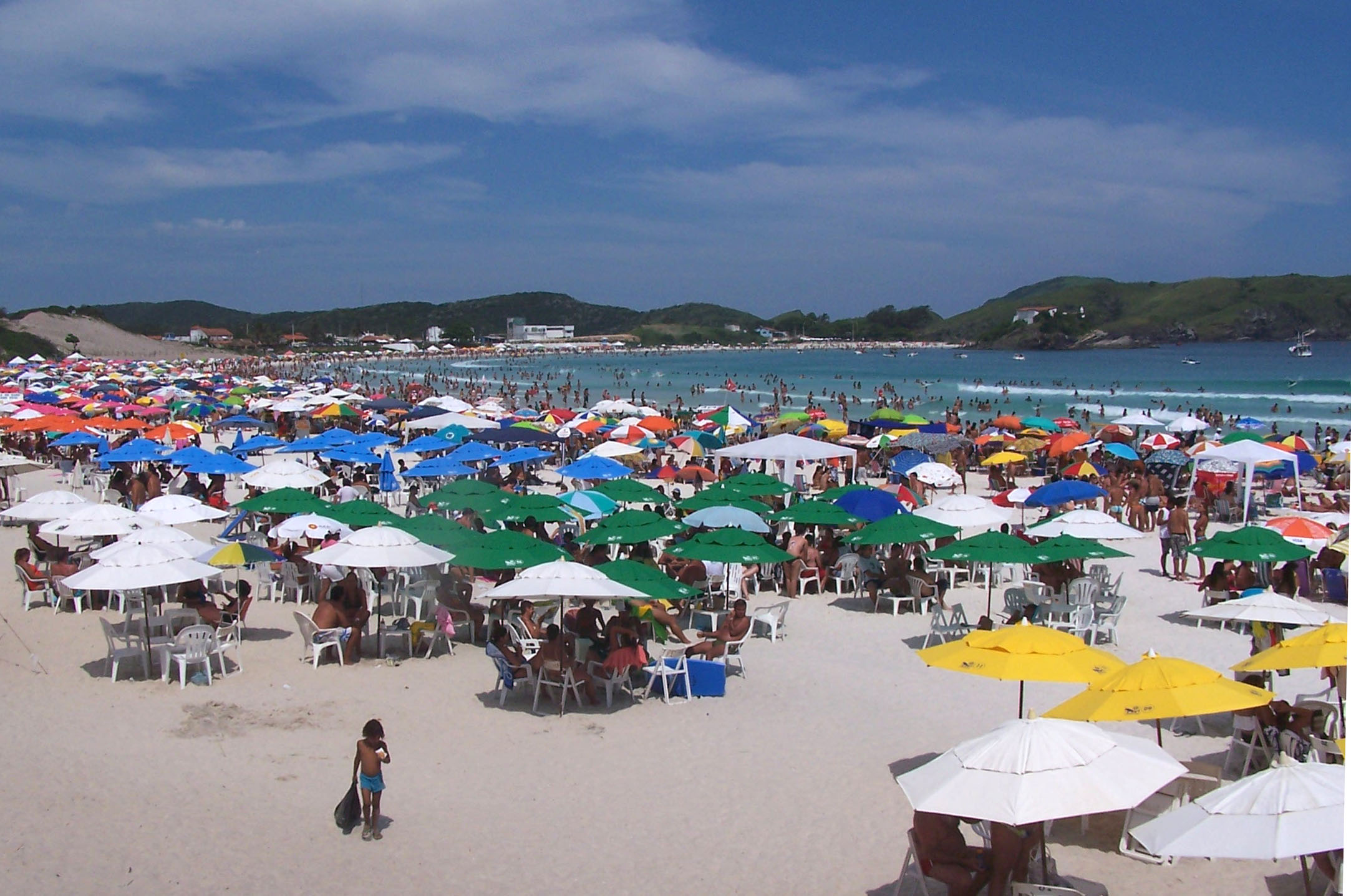 Praia do Forte in Cabo Frio, Brazil